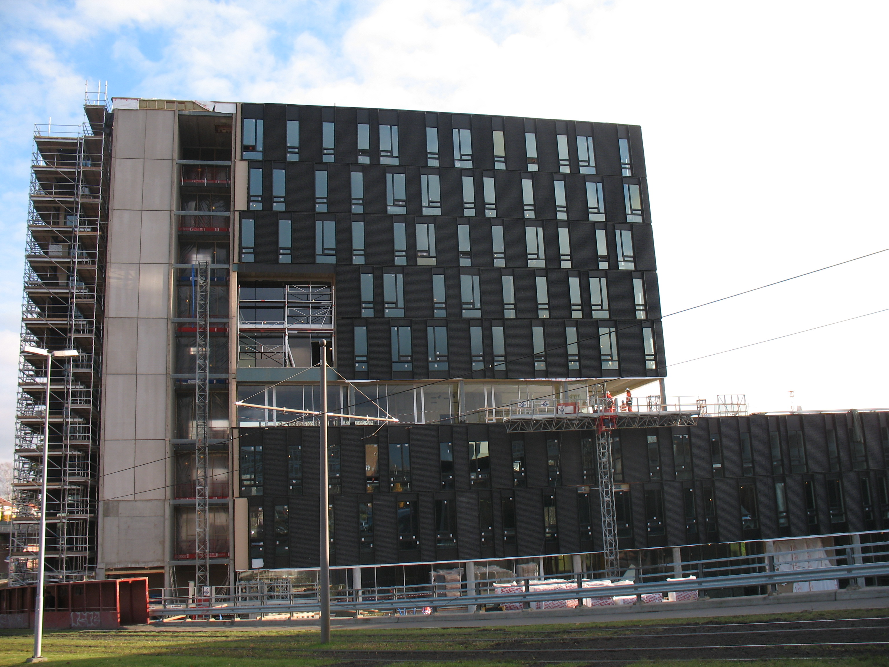 Ifi2, det nye informatikkbygget ved Universitetet i Oslo.